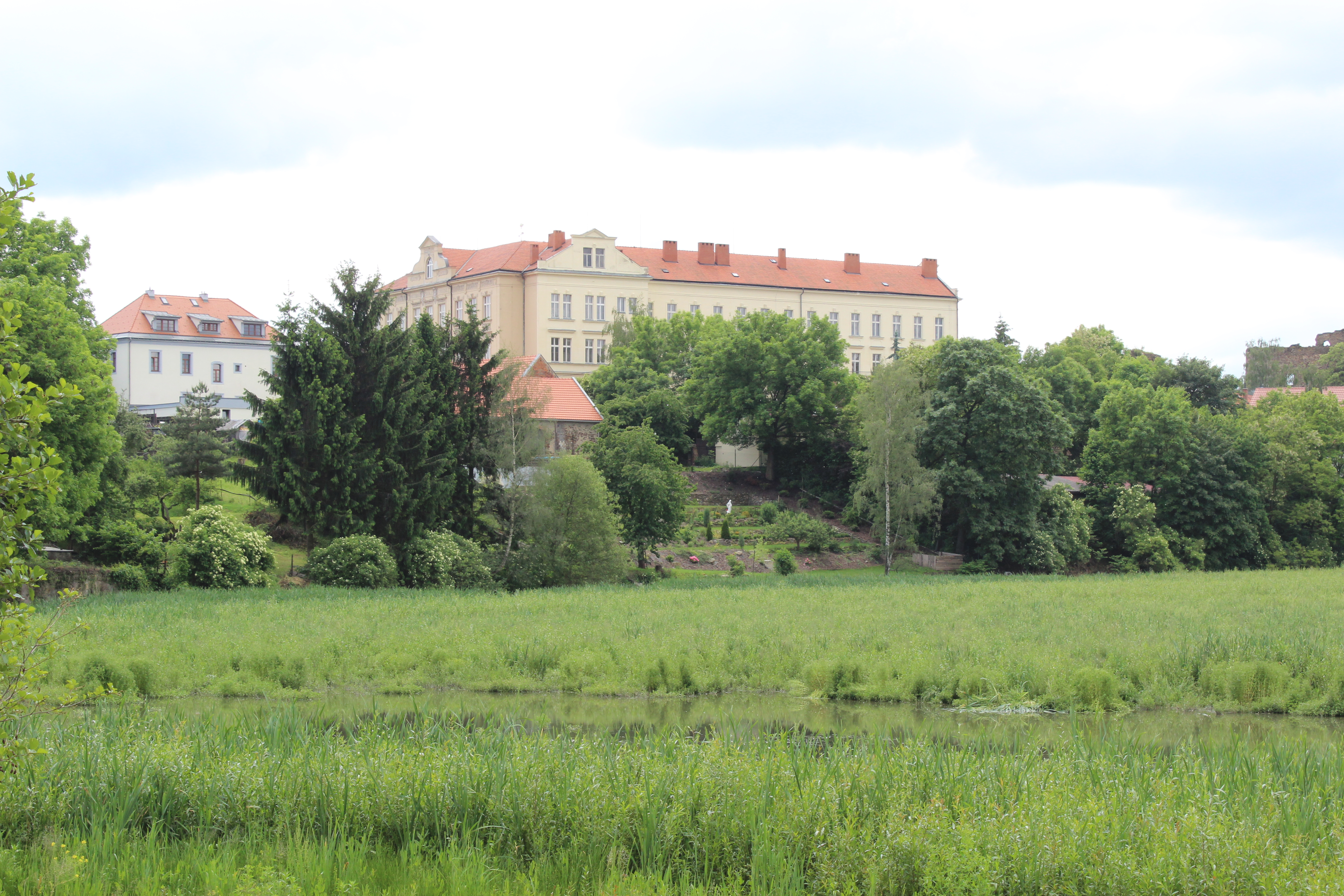 Základní škola Říčany přes rybník jako dominanta